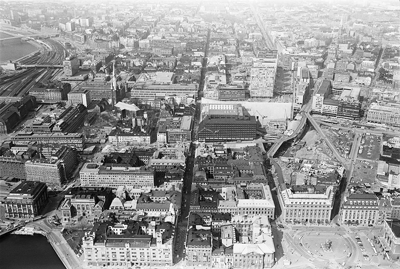 Norrmalm, Gustav Adolfs torg, Brunkebergstorg, Hamngatan, Drottninggatan, Norrmalm, Hötorgsskraporna. Rivningar. City. Motiv: Stockholms innerstad Nyckelord: Flygbilder, Riksintressen Kategori: Stadsmiljö Norrmalm, Gustav Adolfs torg, Brunkebergstorg, Hamngatan, Drottninggatan, Norrmalm, Hötorgsskraporna. Rivningar. City.